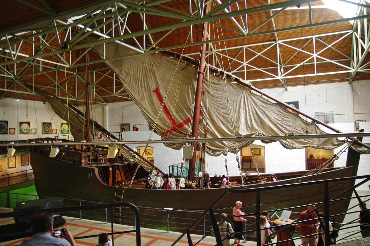 Schiff im Diazmuseum Mossel Bay